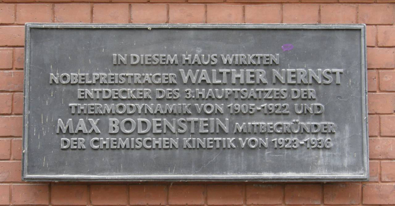 Gedenktafel für Walther Nernst und Max Bodenstein. Physik. Chemisches Institut der Universität, Bunsenstraße 1, Berlin-Mitte